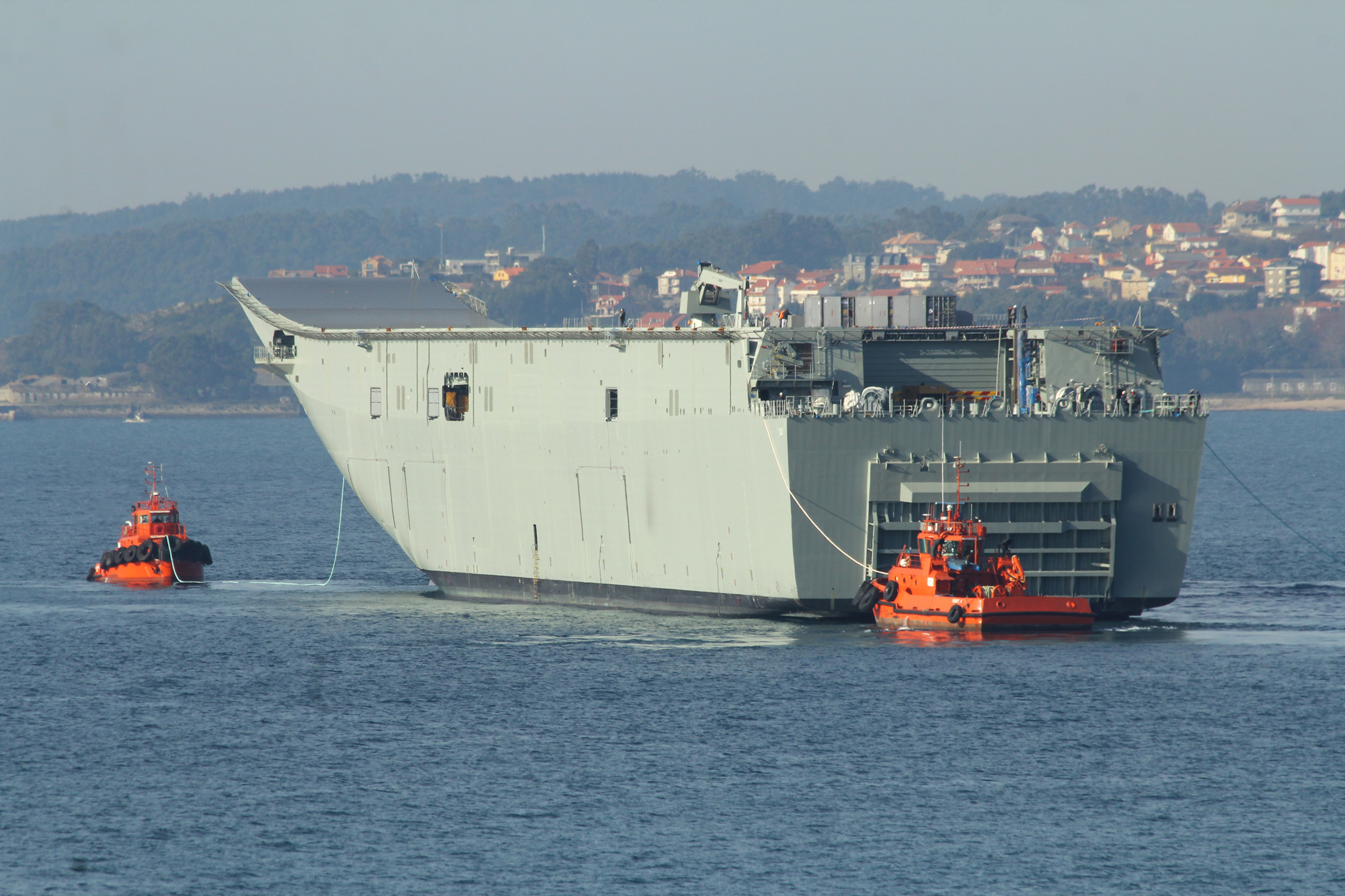 Embarque del portaaviones HMAS Adelaide de la Real Armada Australiana en la plataforma semisumergible Blue Marlin. El portaaviones fue construido por los astilleros de Navantia en Ferrol y la operación de embarque se lleva a cabo en la Ría de Vigo. Una vez cargado, el portaaviones será trasladado a Australia para completar su construcción. Vigo: Boarding of the aircraft carrier HMAS Adelaide at Blue Marlin platform Boarding of the aircraft carrier HMAS Adelaide of the Royal Australian Navy in the Blue Marlin semi-submersible platform. The aircraft carrier was built by Navantia shipyard in Ferrol and boarding operation is carried out in the Vigo Estuary. Once loaded, the aircraft carrier will be moved to Australia to complete its construction.